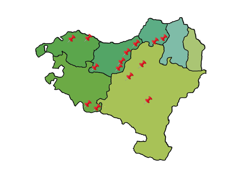 Euskal Herriko mapa honek inguru horietan dauden trikuharri esanguratsuenen lokazizazio zehatza adierazten du